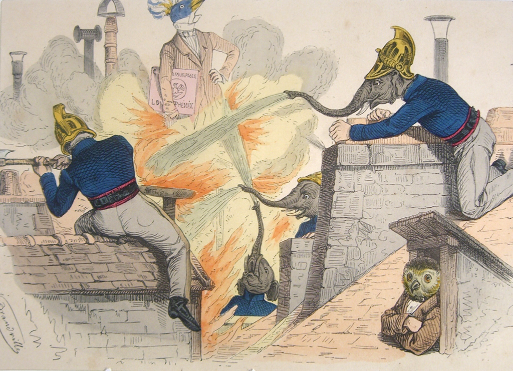 Tiere als Menschen verkleidet. Lithographie von Grandville, 19. Jh.